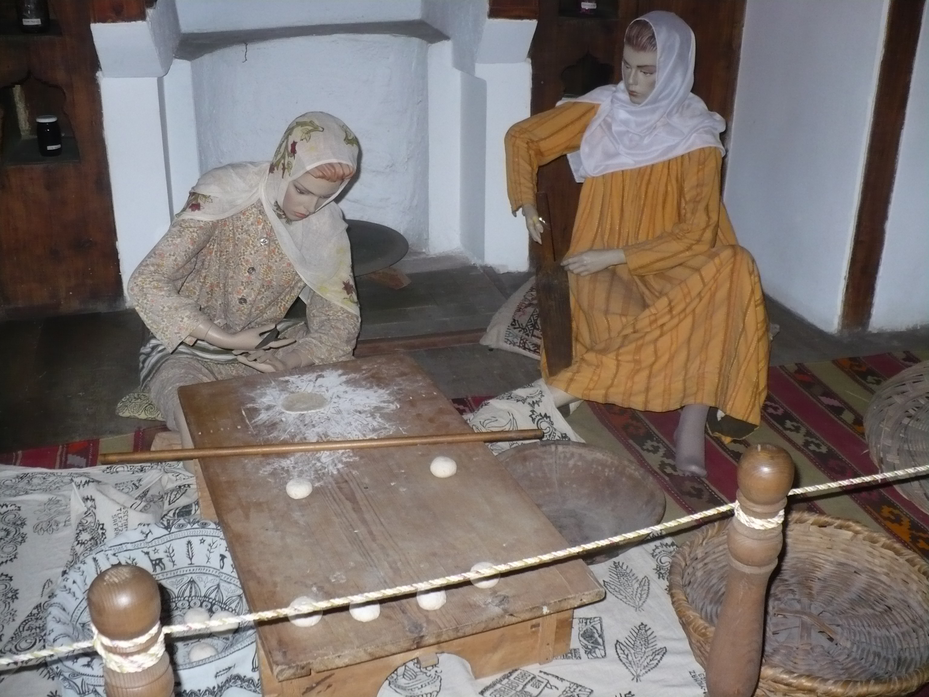 Safranbolu Kent Tarihi Müzesi